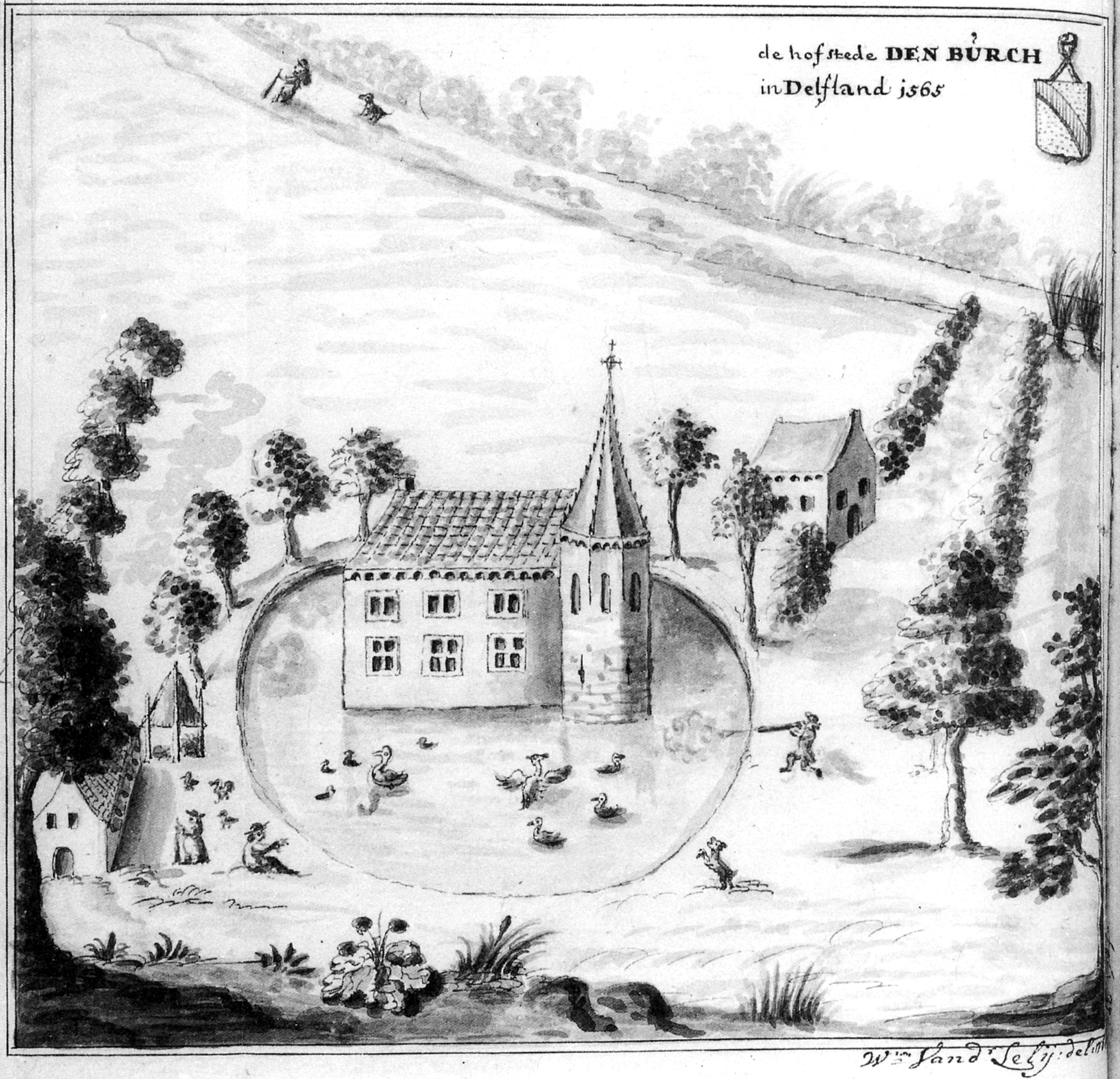 Hofstede den Burch in Rijswijk. Den Burch was vermoedelijk de eerste burcht die in Rijswijk werd gebouwd in de Middeleeuwen. De aquarel baseert op een tekening uit 1565 van Jan Jansz. Potter.